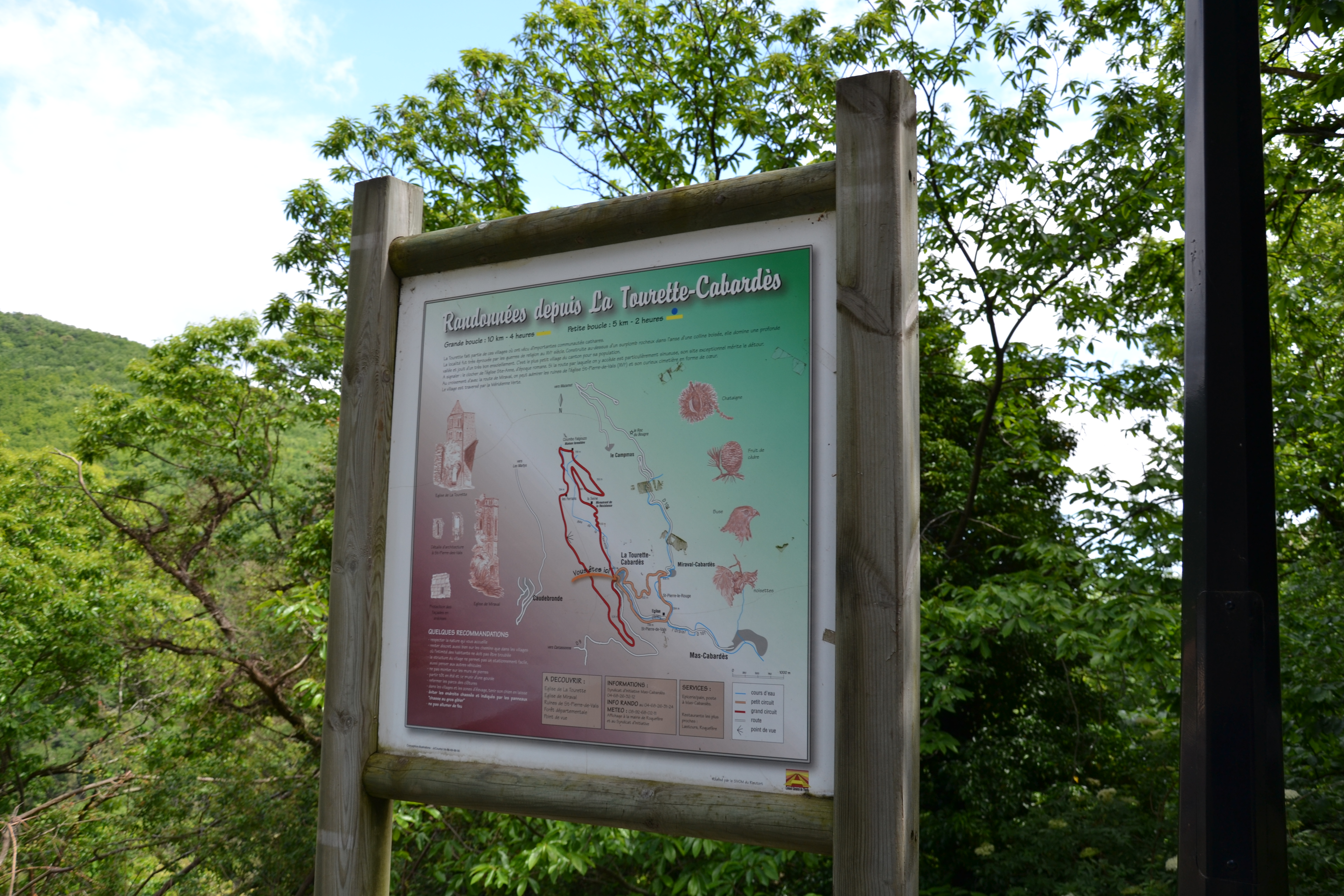 Panneau de randonnées autour de La Tourette-Cabardès